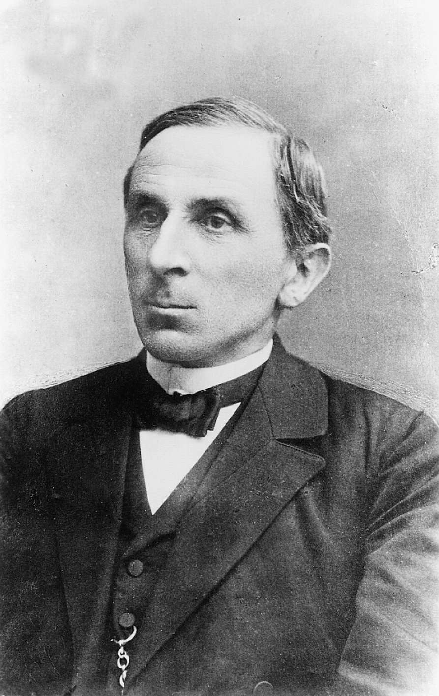 Jakub Nowak-Horjanski